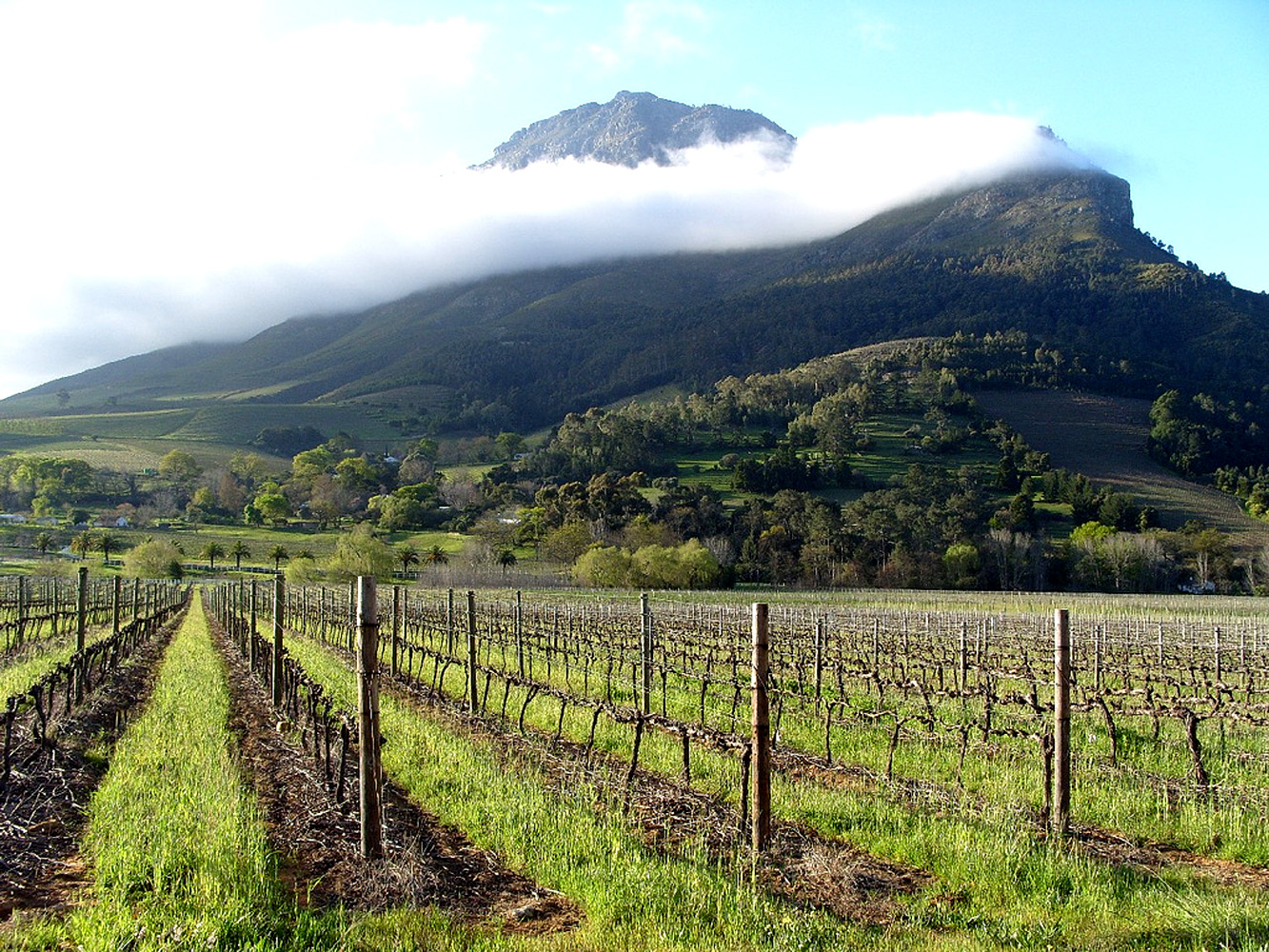 Vignes palissées